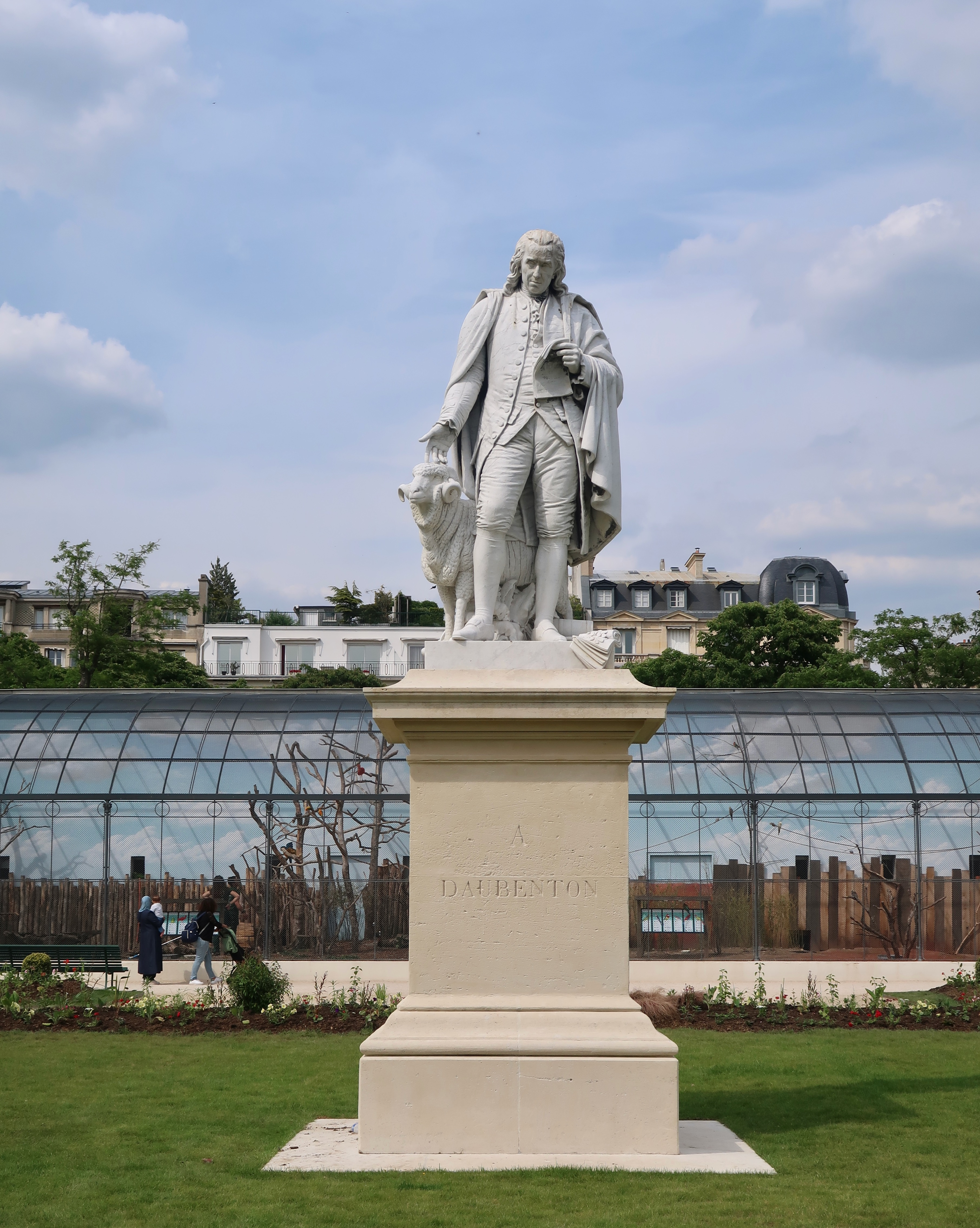 Statue de Daubenton, dans le jardin d'acclimatation, bois de Boulogne (Paris, 16e).